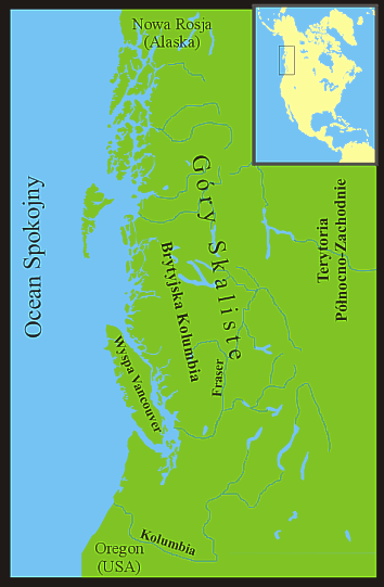 Kolumbia Brytyjska (kolonia)